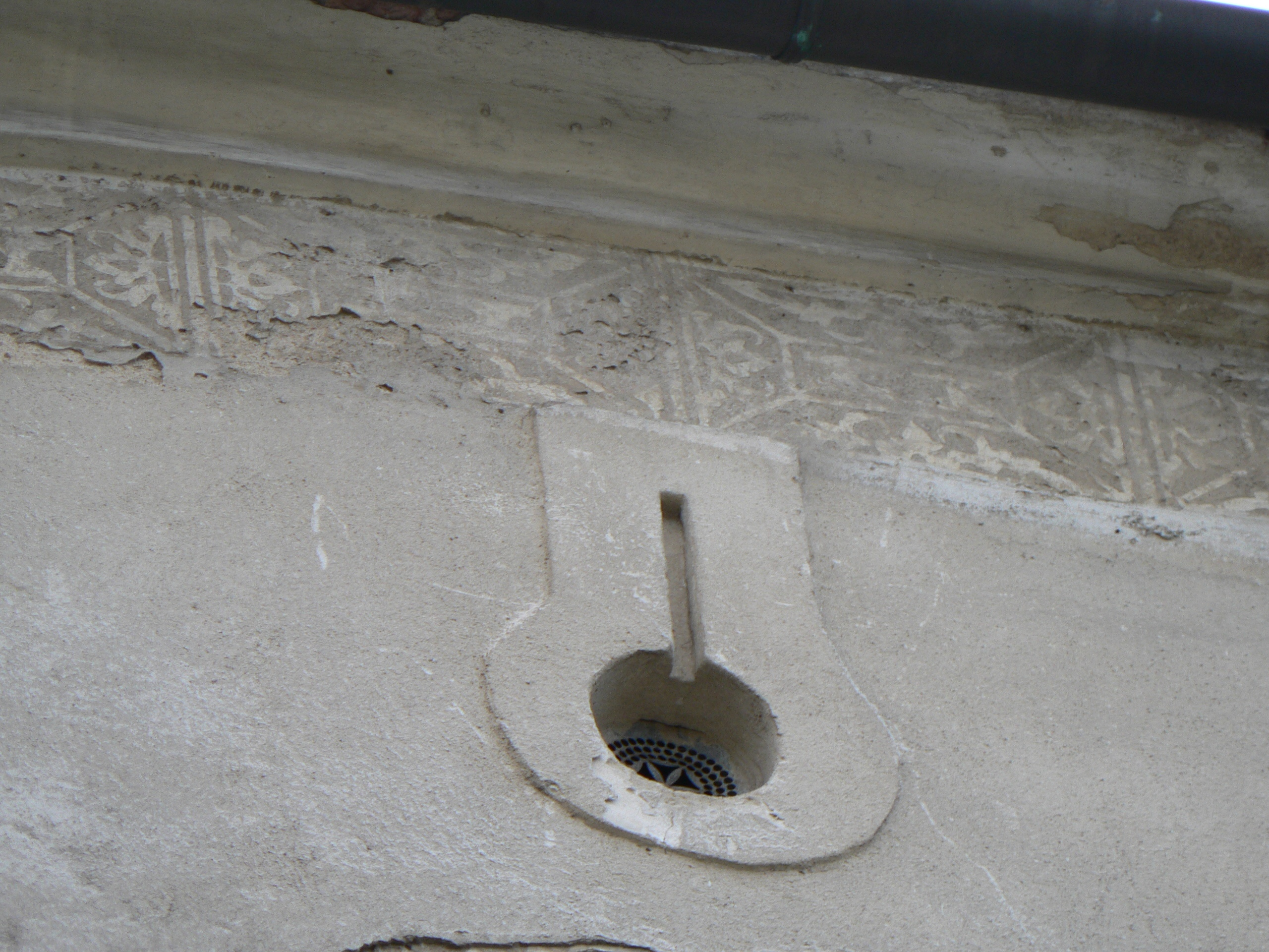 Kostel Všech svatých (Bratrušov), detail fasády